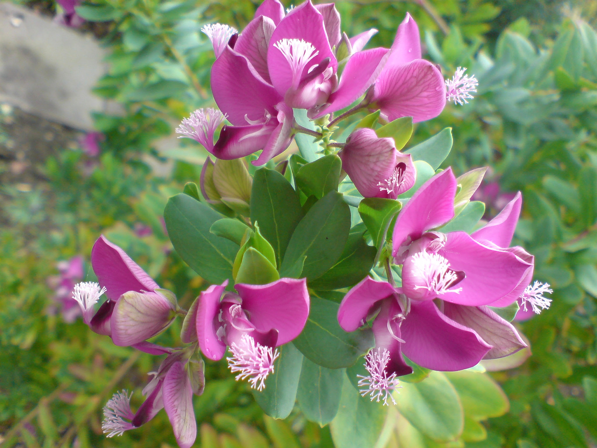 Polygala myrtifolia - Botanischer Garten Leipzig